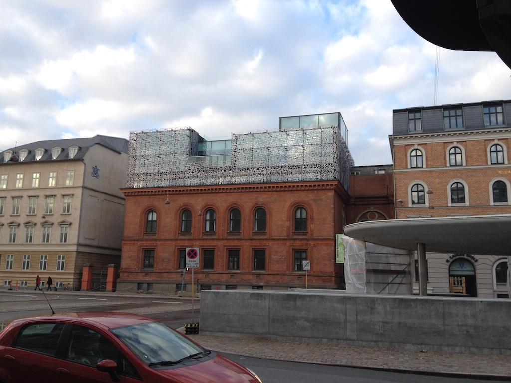 Zahles Gymnasium on Nørre Voldgade in Copenhagen, Denmark